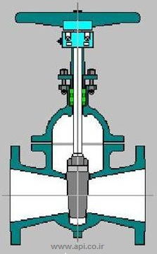 تصویر آموزشی شیر دروازه ای با مجرابند گوه ای شکل